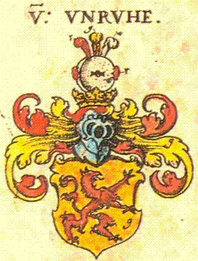 Wappen der Schlesischen Adelsfamilie Unruh.